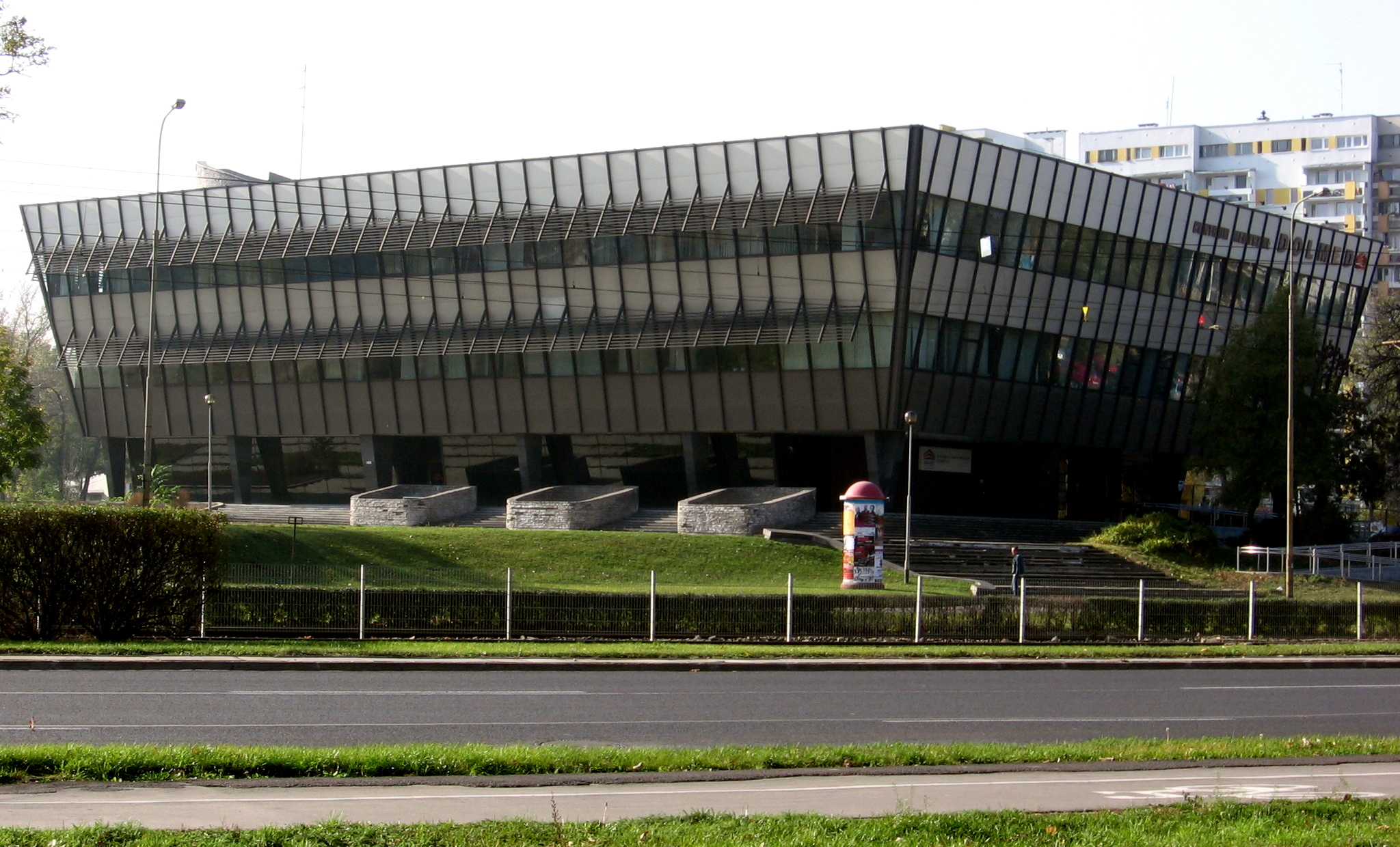 budynek Dolnośląskiego Centrum Medycznego "Dolmed" w Wrocławiu, ul. Legnicka 40; widok z przeciwnej strony ul. Legnickiej (na pierwszym planie)